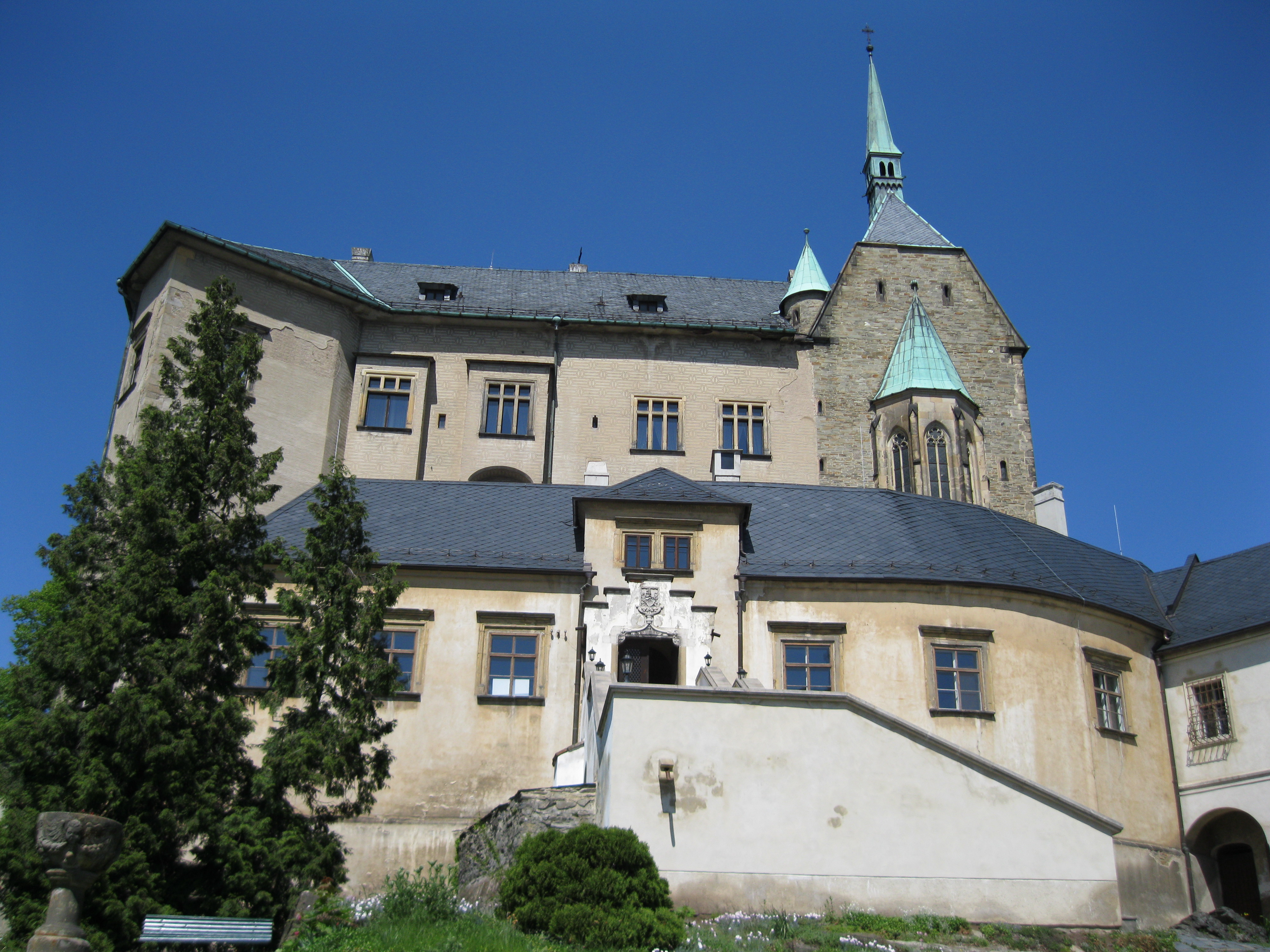 Hrad Šternberk (Šternberk)